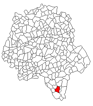 Localisation de Boussay en Indre et Loire